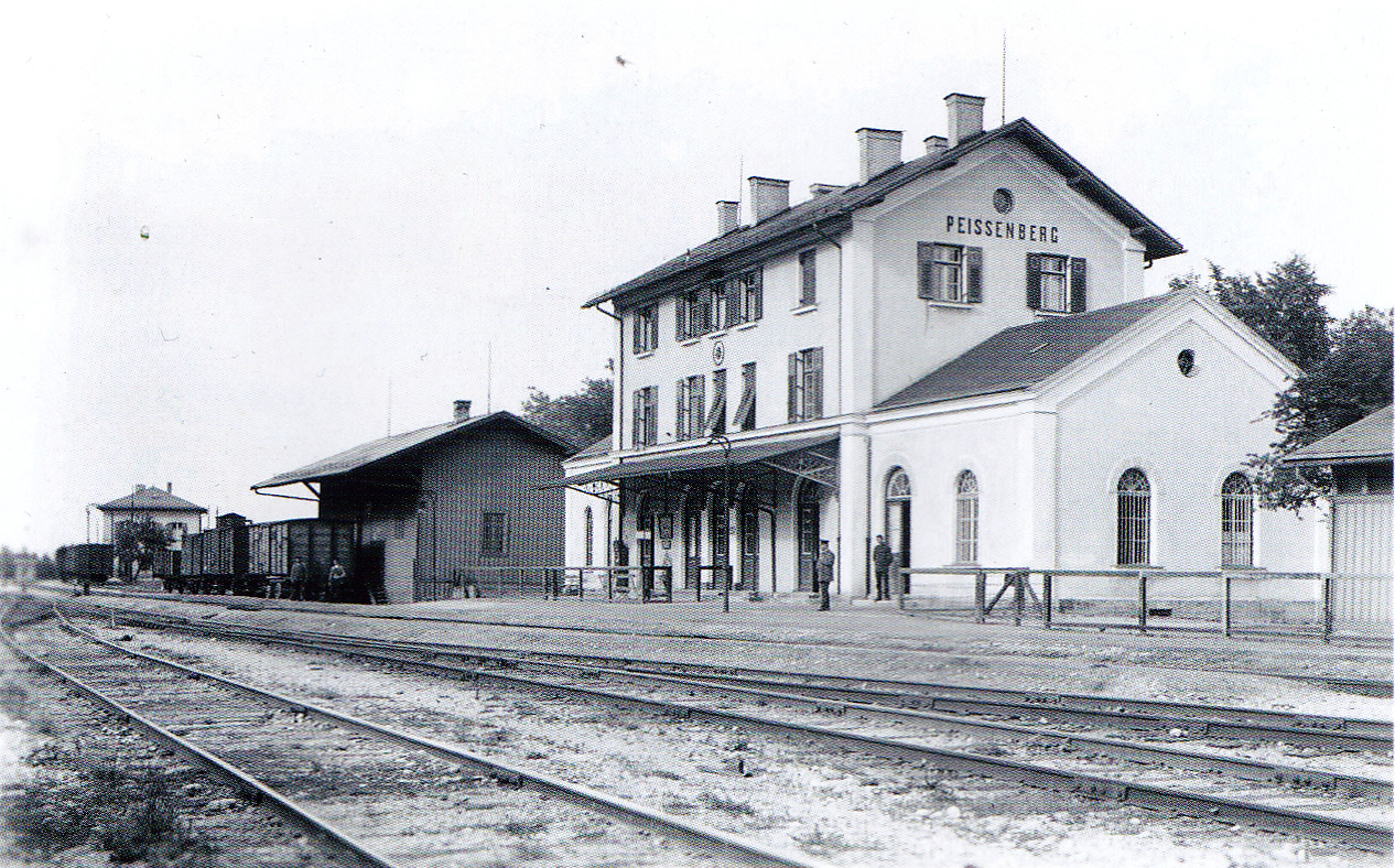 Empfangsgebäude des Bahnhofs Peißenberg von der Gleisseite, links der Güterschuppen